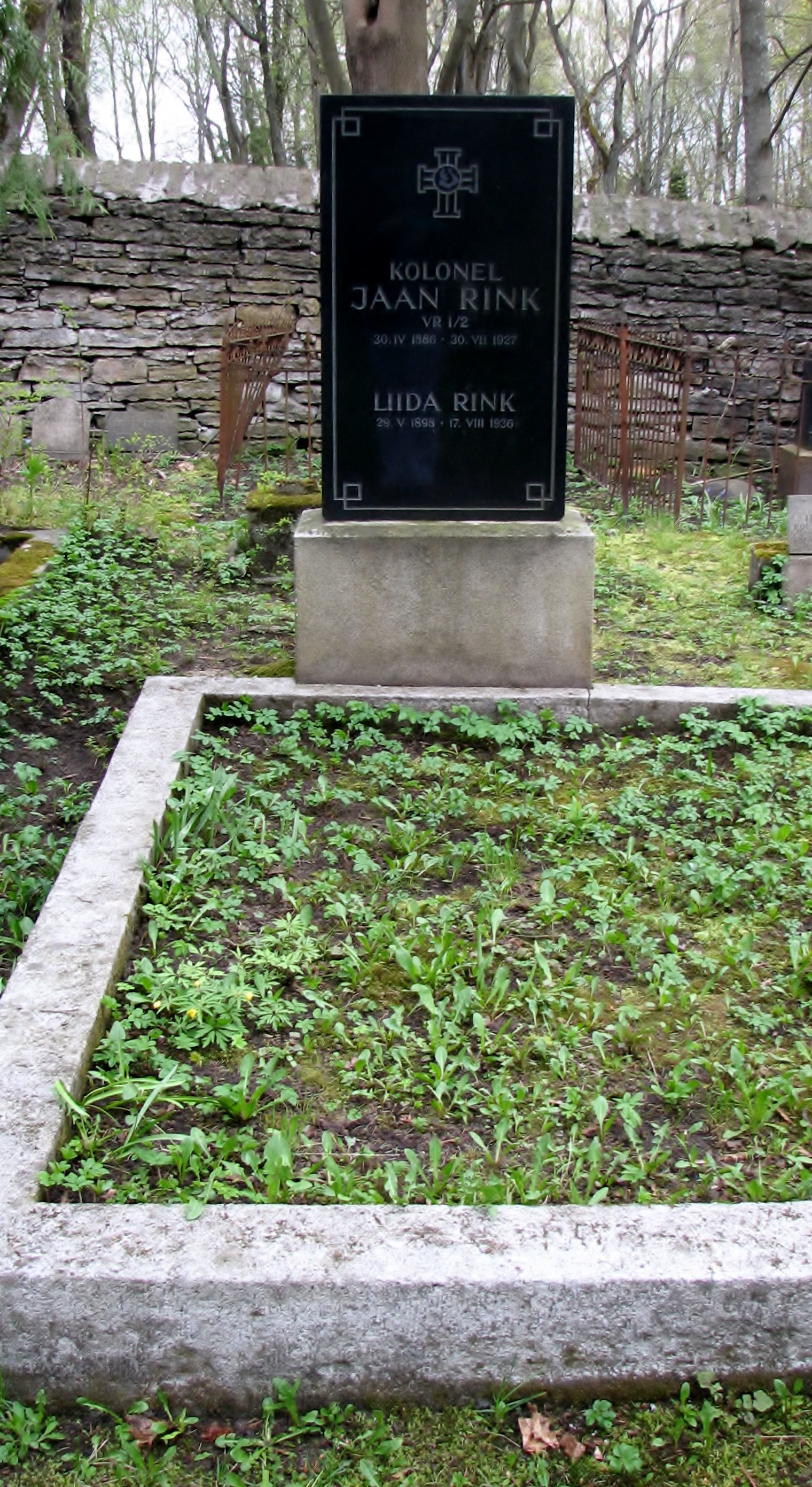 Jaan ja Liida Rinki haud Siselinna kalmistul